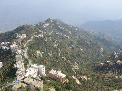 this Faifa City in Saudi Arabia